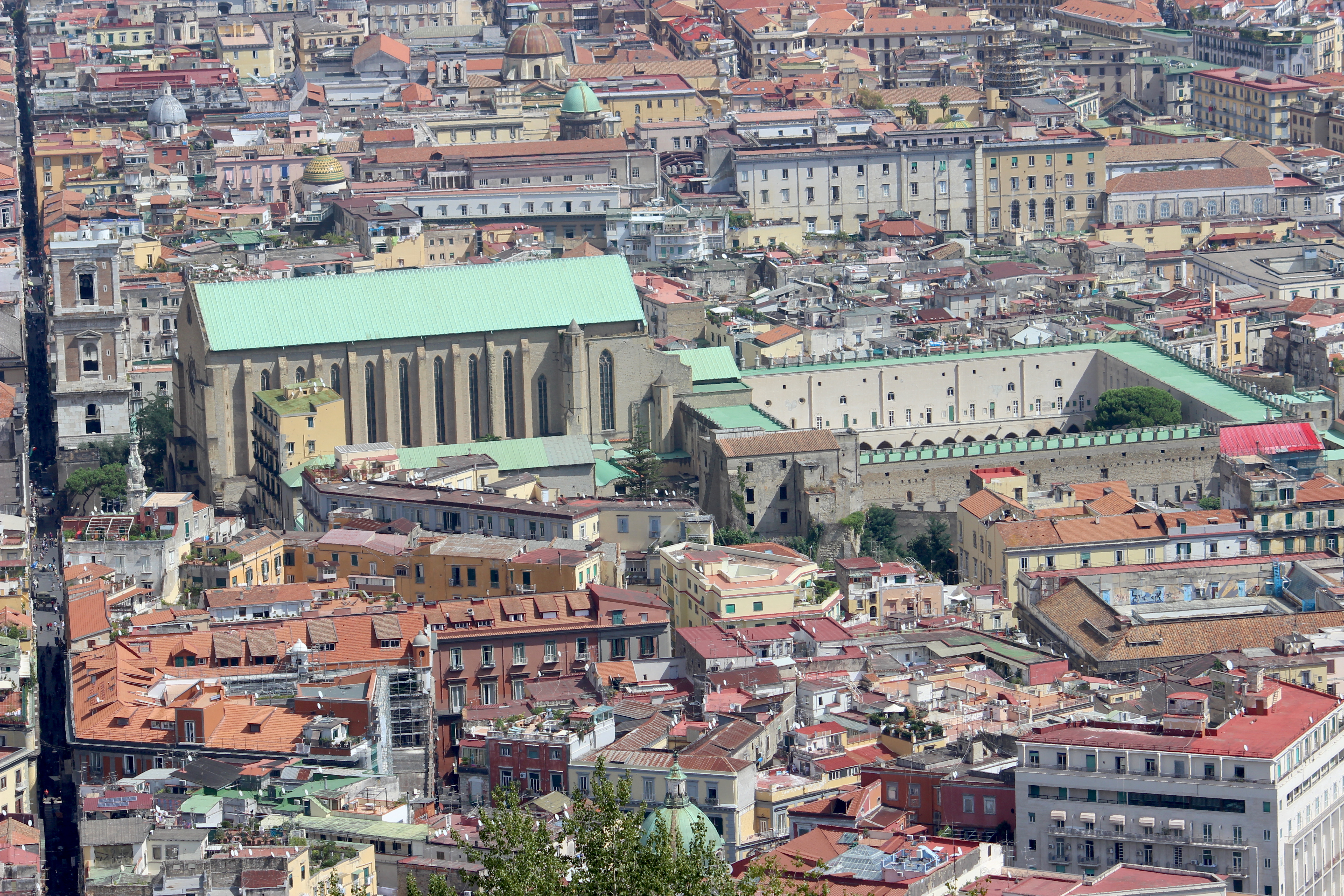 Nápoles. Santa Chiara vista desde Sant'Elmo.